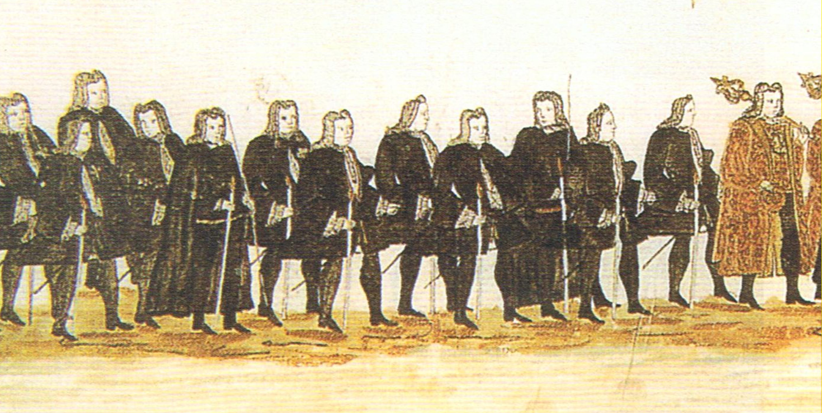 Caballeros veinticuatro de Sevilla en la procesión del Corpus Christi a principios del siglo XVIII